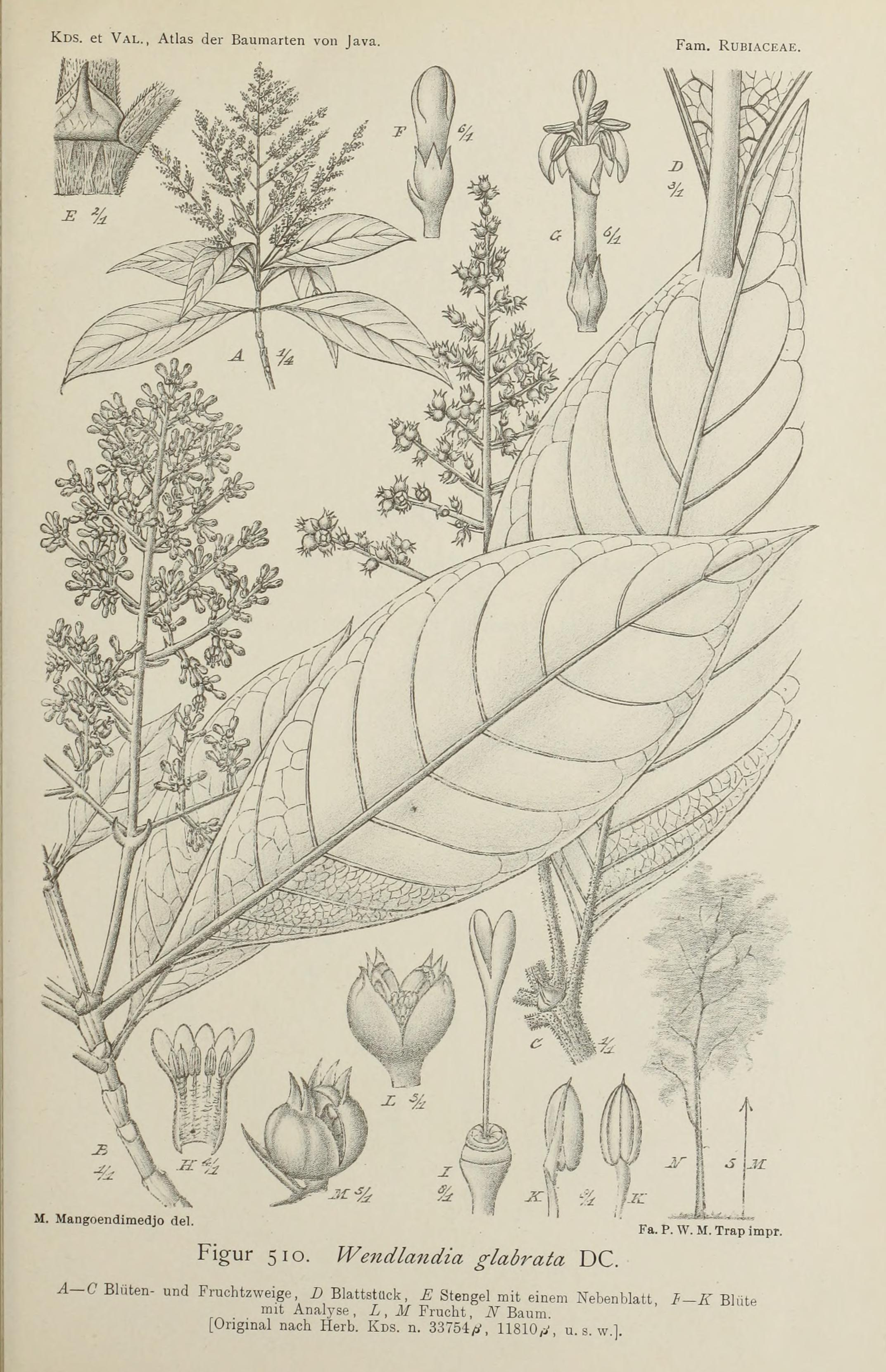 Atlas der baumarten von Java : im anschluss an die "Bijdragen tot de kennis der boomsoorten van Java" / zusammengestellt von dr. S.H. Koorders und dr. Th. Valeton ; mit unterstützung der Niederländsch- indischen regierung ; Herausgegeben von dr. S.H. Koorders.